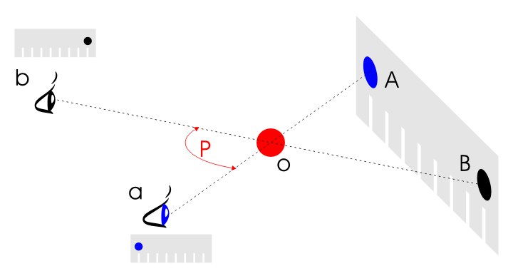 P - paralaxa; a, b - miesta pozorovania; A, B - poloha pozorovaného objektu (o) na pozadí.